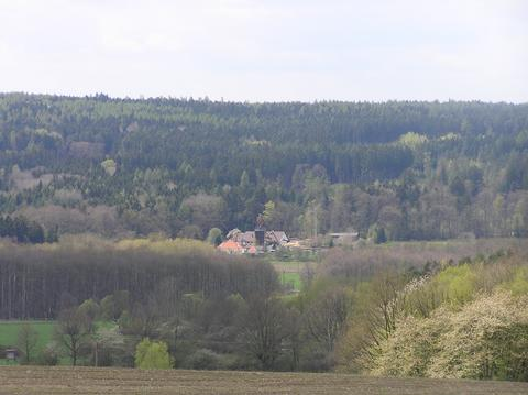 Luh, pila a myslivna